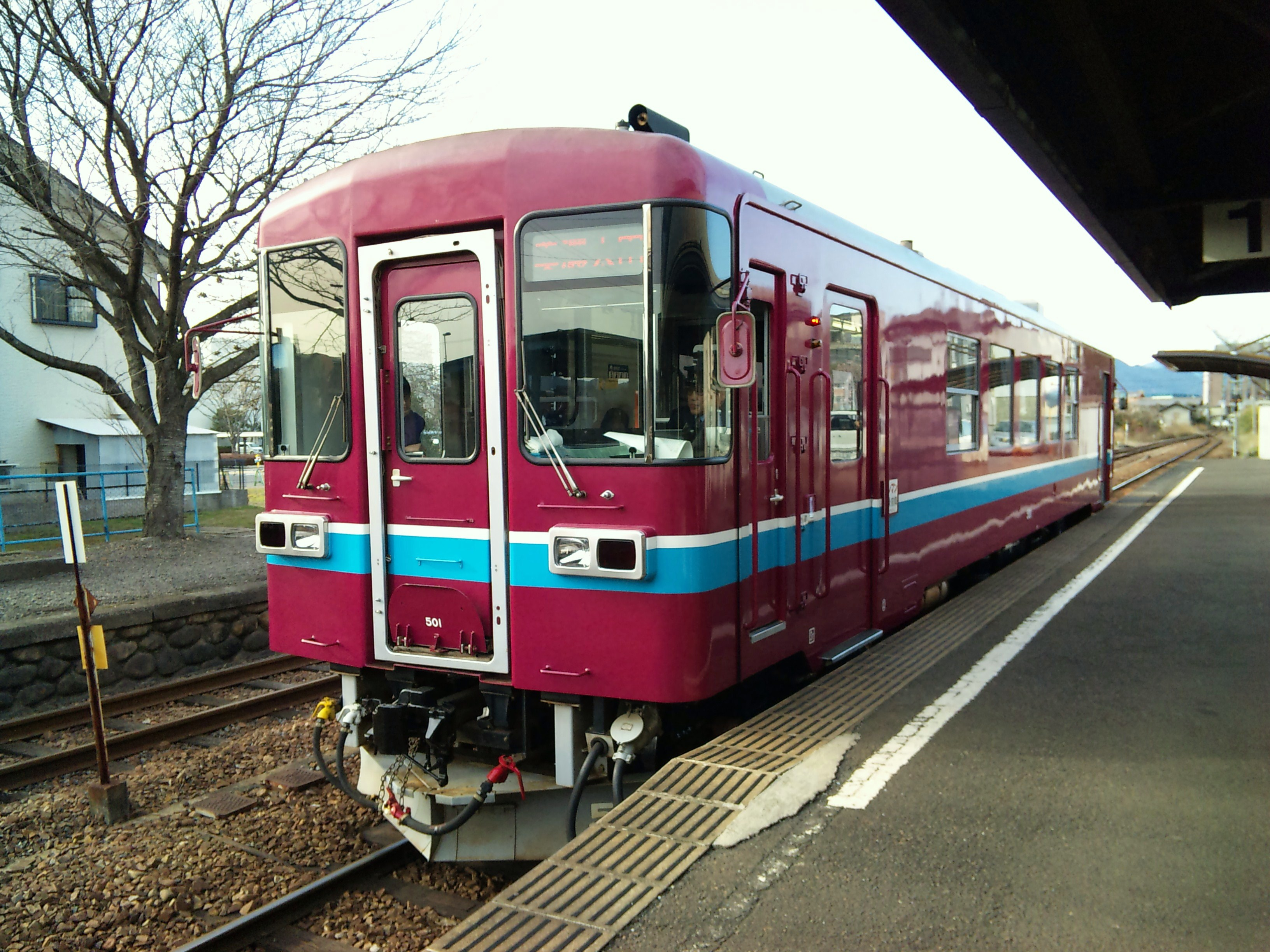 関駅で撮影